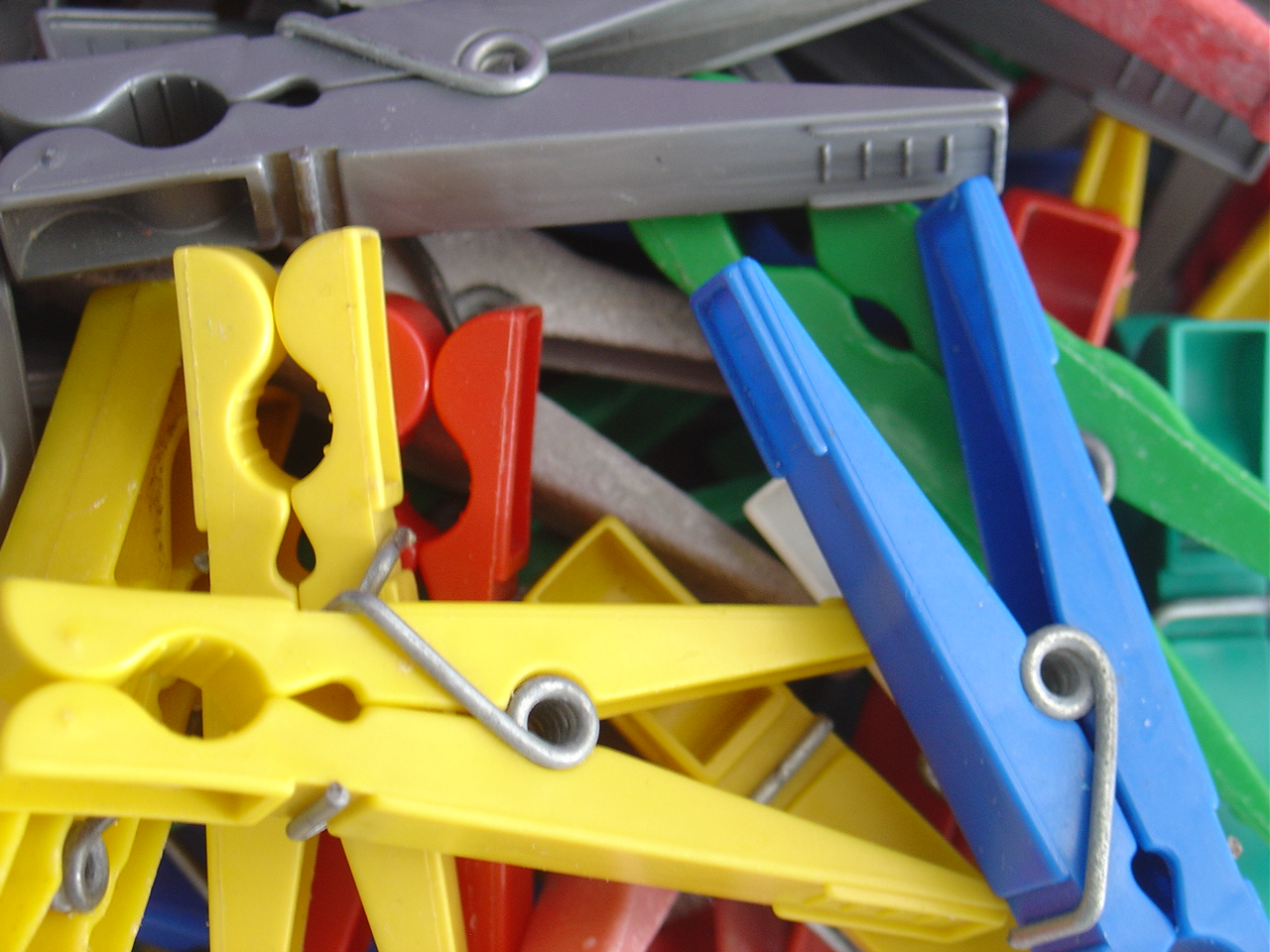 Gwaskoù plastik.